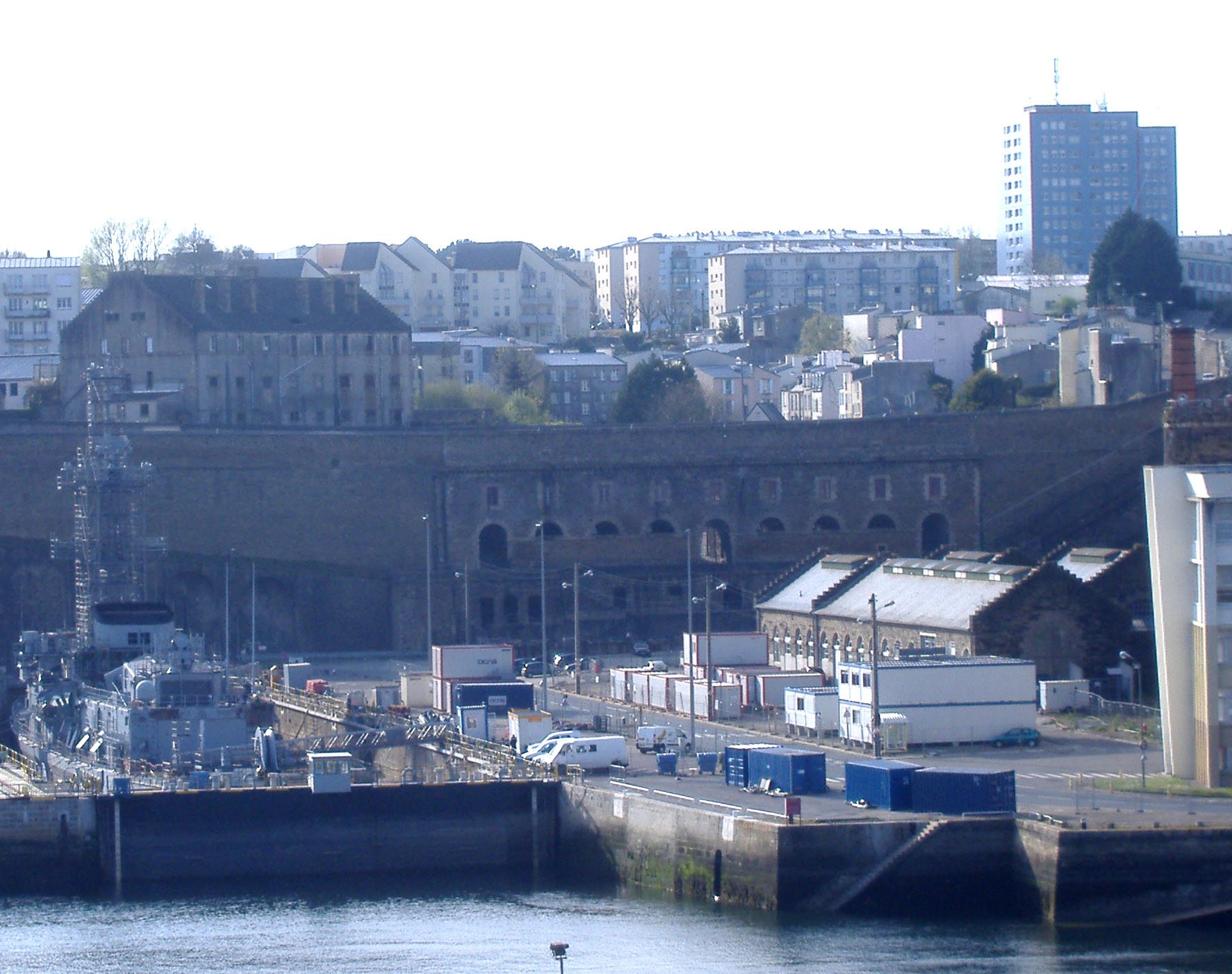 Bâtiment aux Lions, XIXe siècle (Brest). A gauche, la frégate ASM Primauguet au bassin 3, surplombée par l'ancienne prison de la Madeleine ; à droite, les anciennes forges de Pontaniou et à l'arrière-plan, les tours de Quéliverzan.